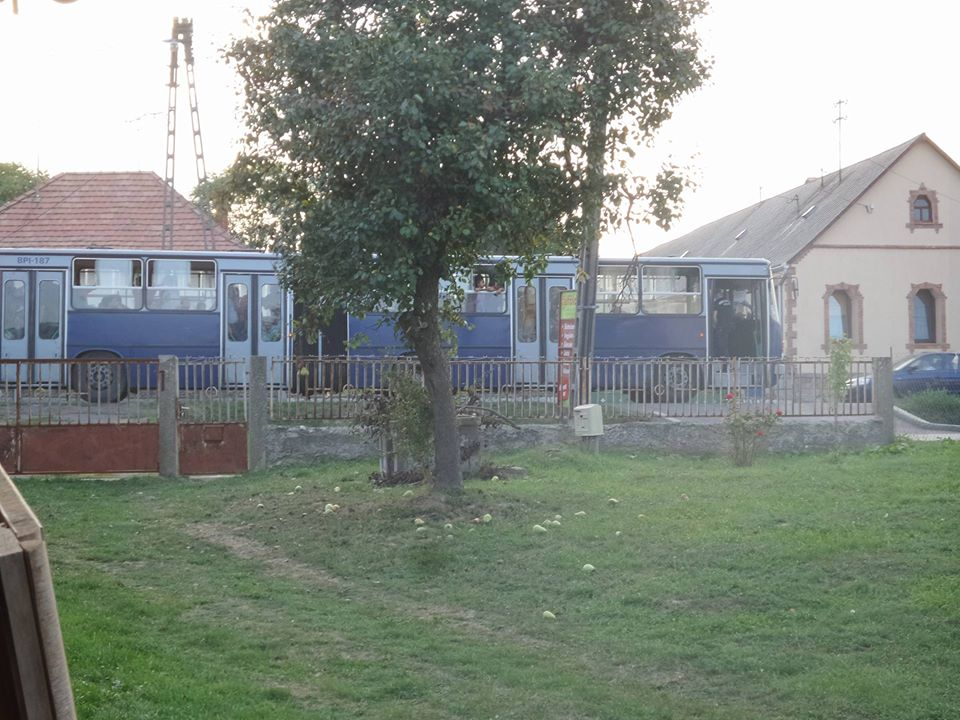 BKV busz Szalántán az európai migrációs válság idején